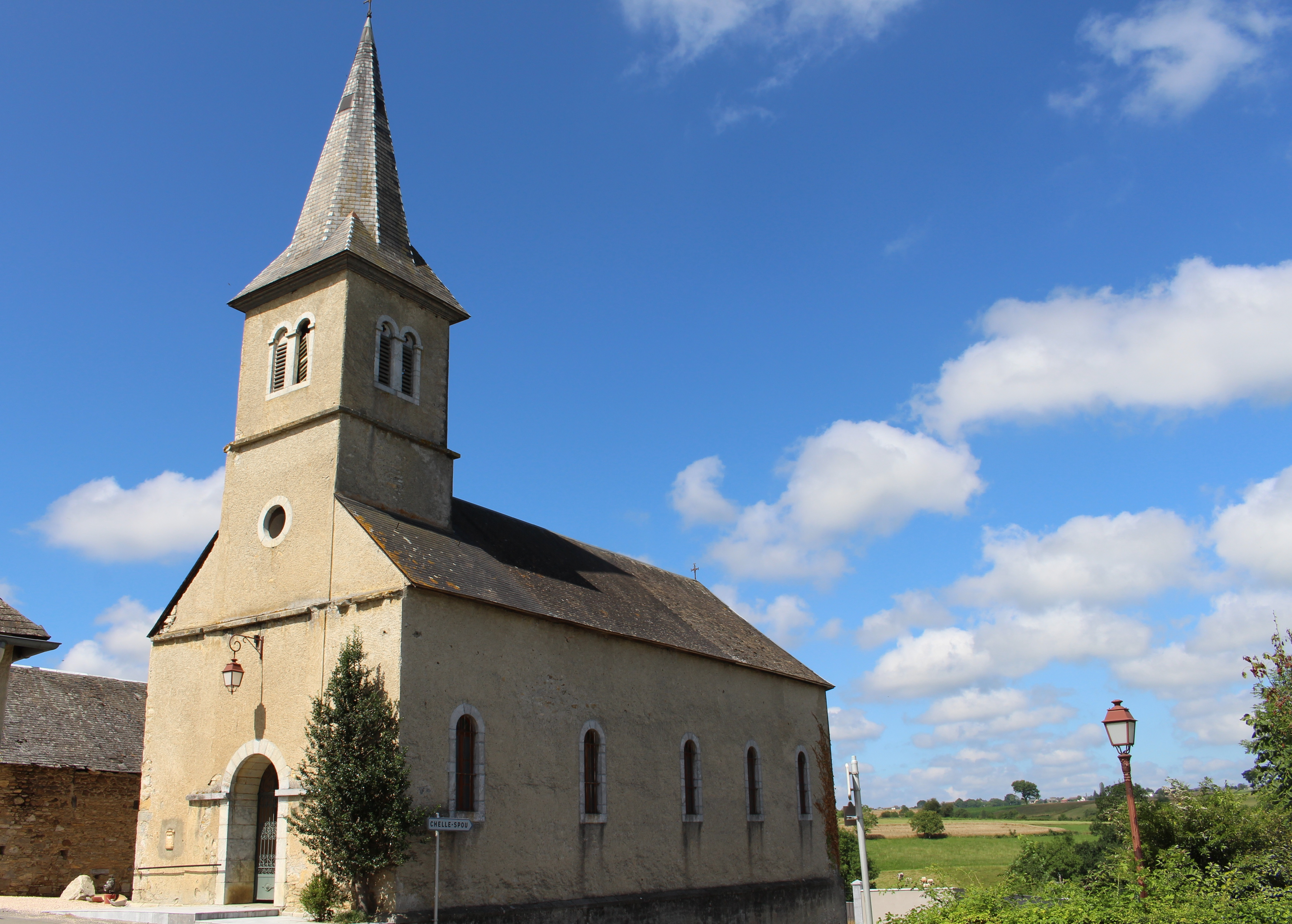 Église de l'Assomption d'Artiguemy (Hautes-Pyrénées)